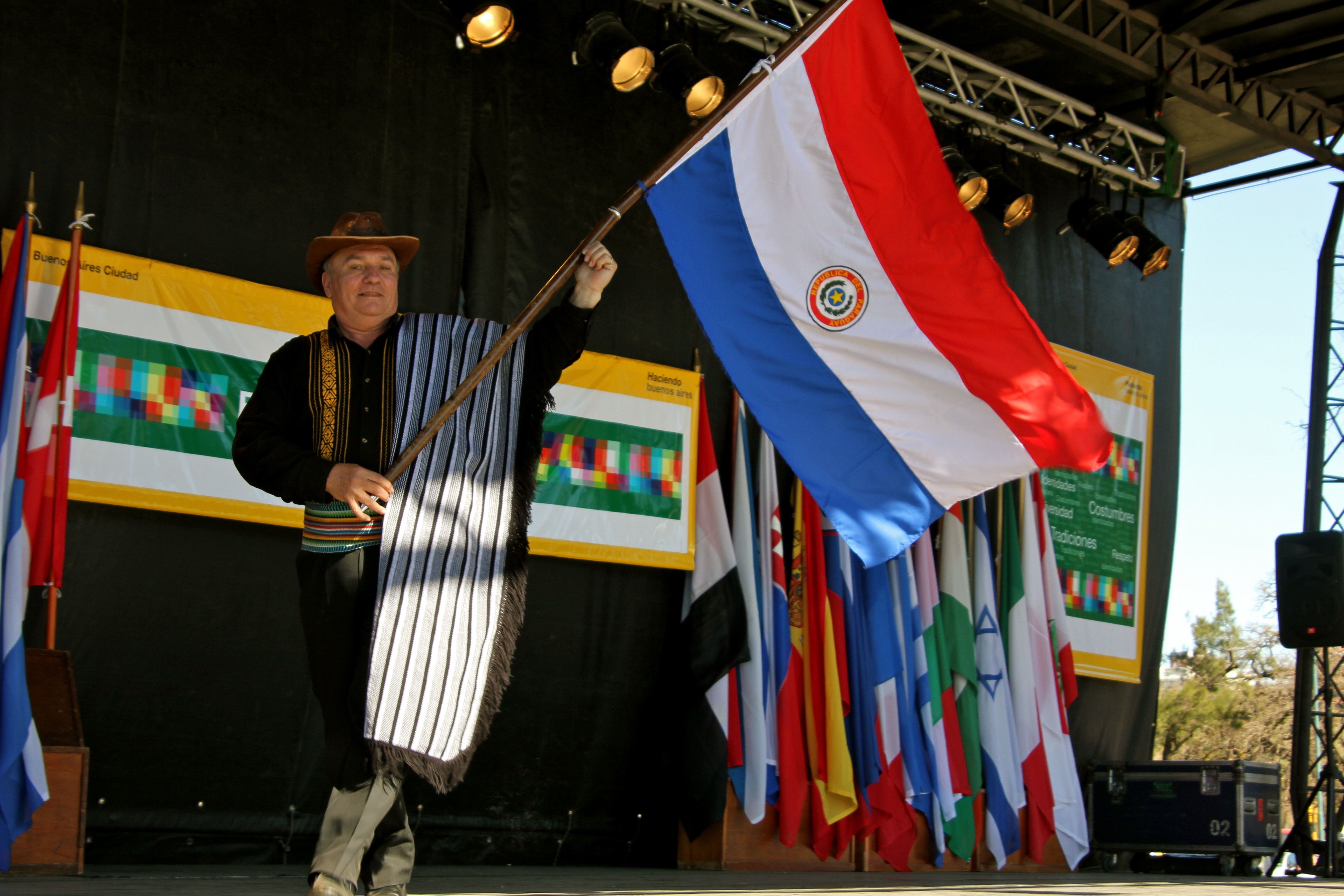 Dia del Inmigrante 2010 53